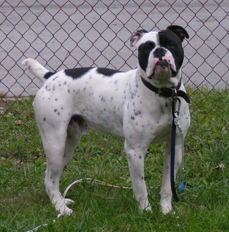 An Olde English Bulldogge named Duke.